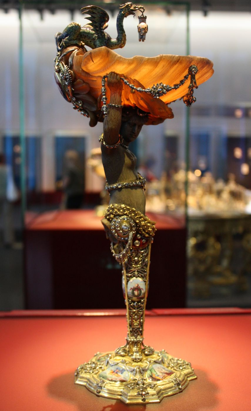 Benjamin Thomae, Johann Melchior Dinglinger, Pokal mit der Mohrin, Dresden, um 1709